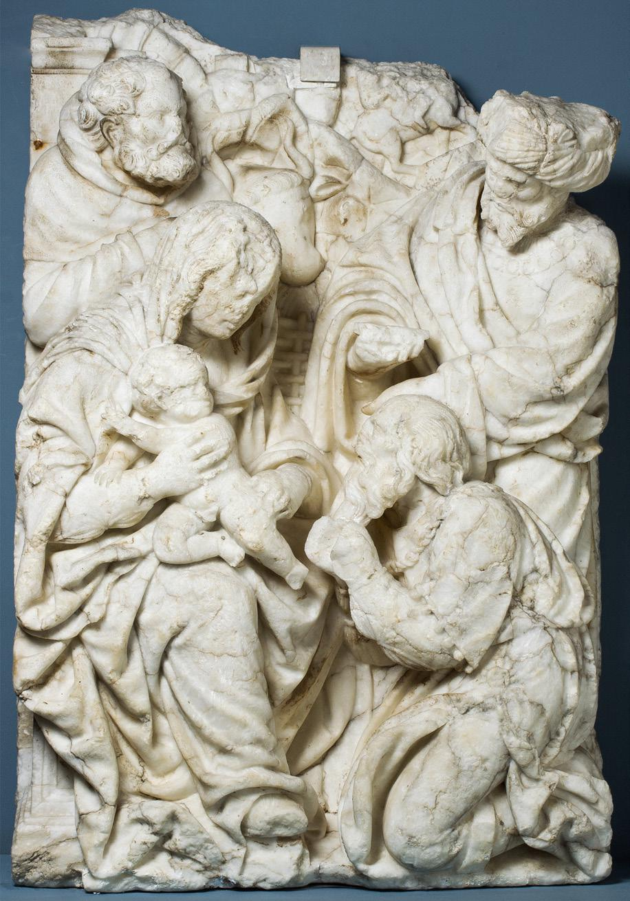 La obra representa el episodio bíblico de la Adoración de los Reyes Magos.